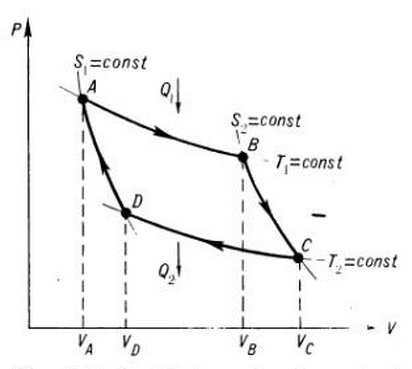 Կառնոյի ցիկլ